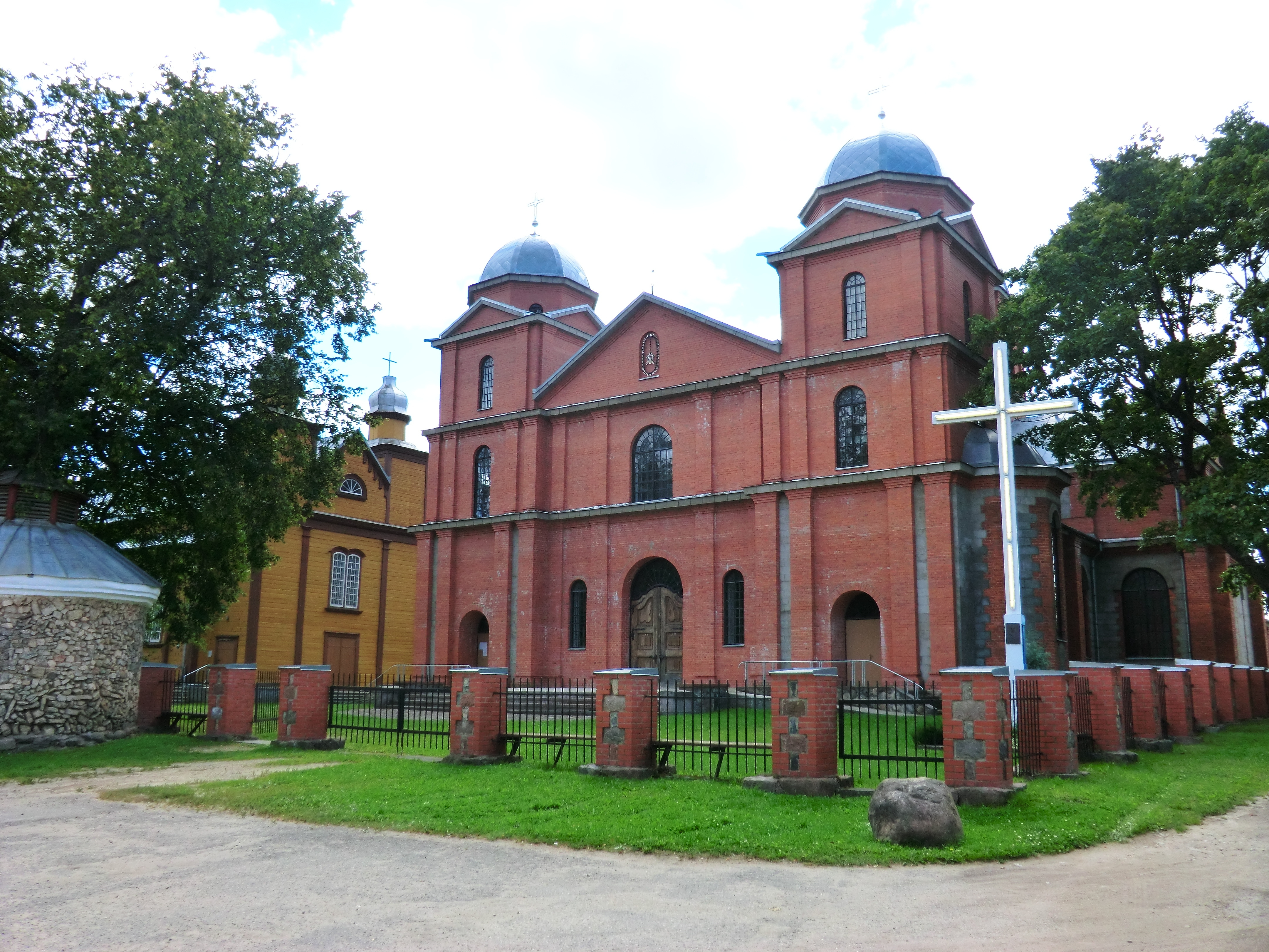 Старый и новый католический костёл, Карсава.